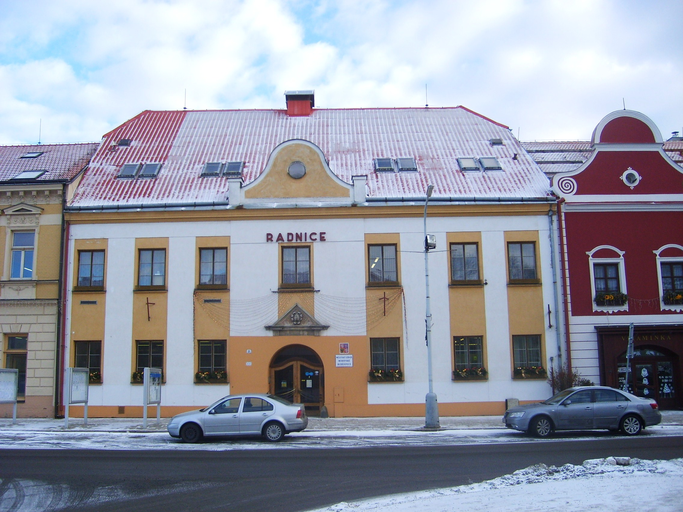 City hall in Moravské Budějovice, Czech Republic